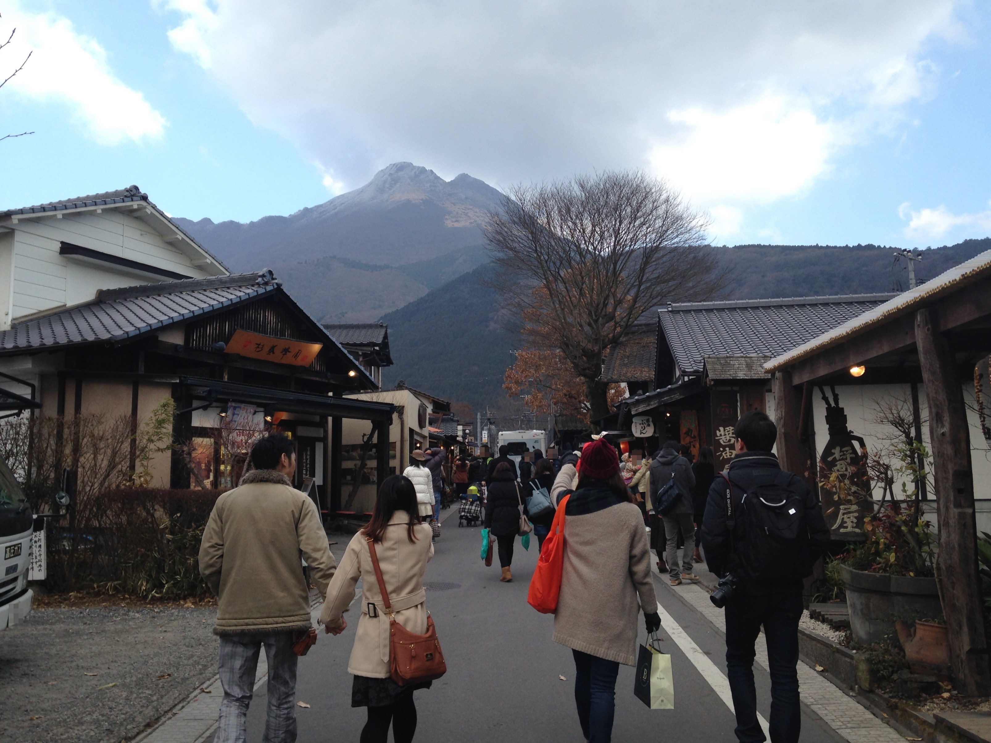 湯の坪通りより望む由布岳